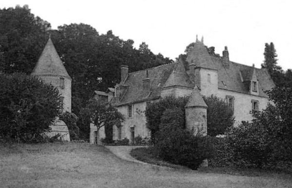 Photo ou carte postale représentant le château et le hameau du Grand Martigny à Fondettes au début du XXe siècle.